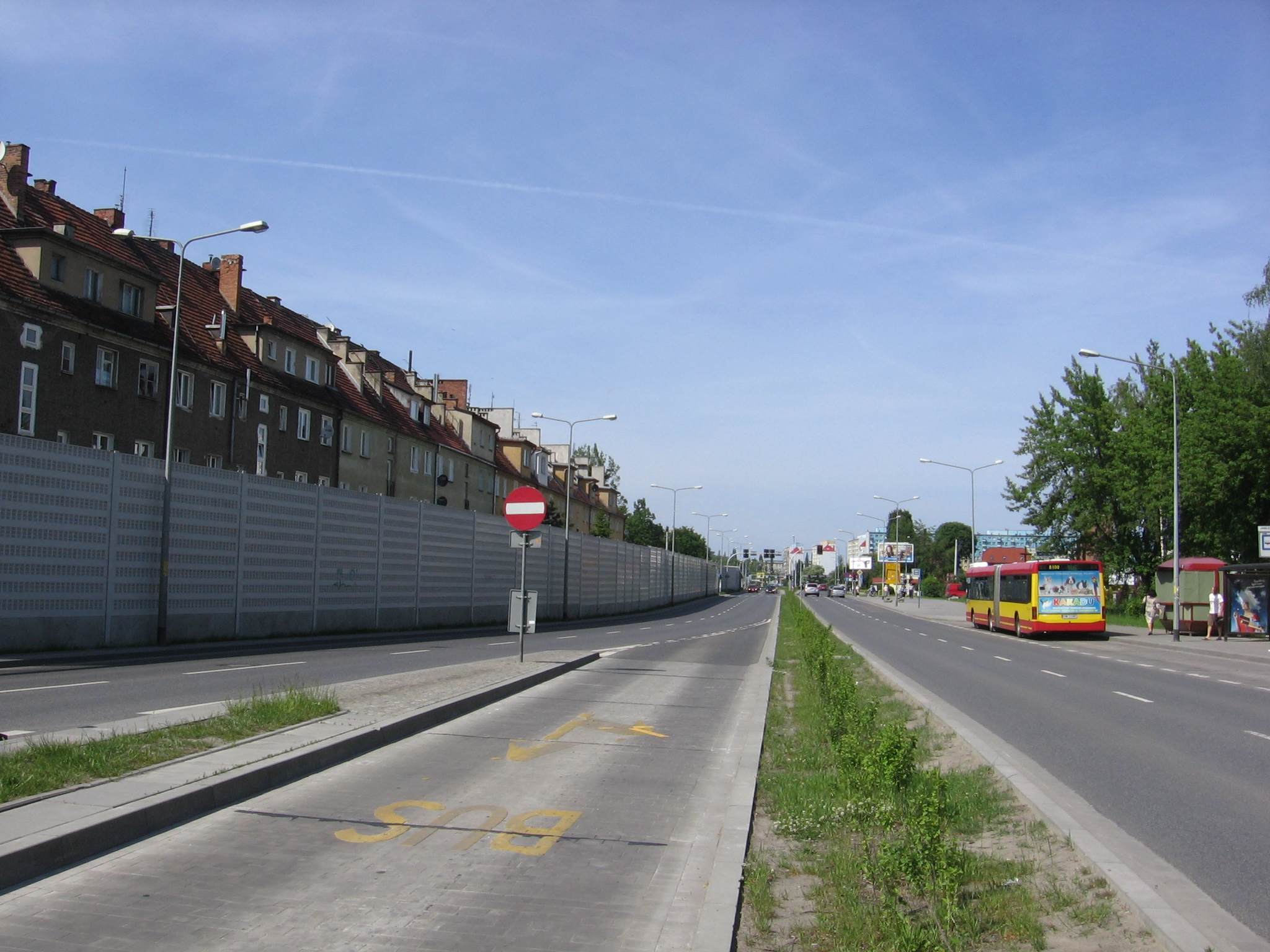 ulica Borowska we Wrocławiu, widok ze skrzyżowania z ul. Działkową na północ